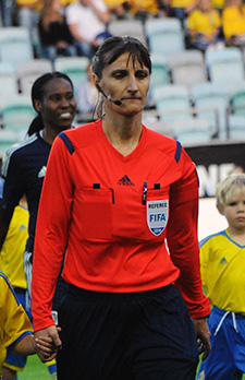 a_3_1578